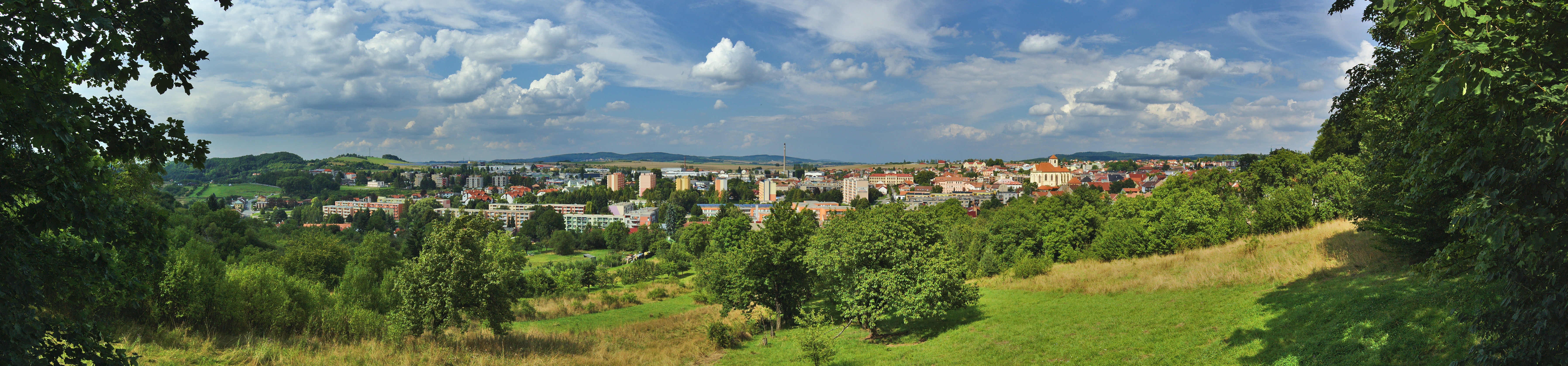 Panoramatický pohled na město od jihu, Boskovice, okres Blansko